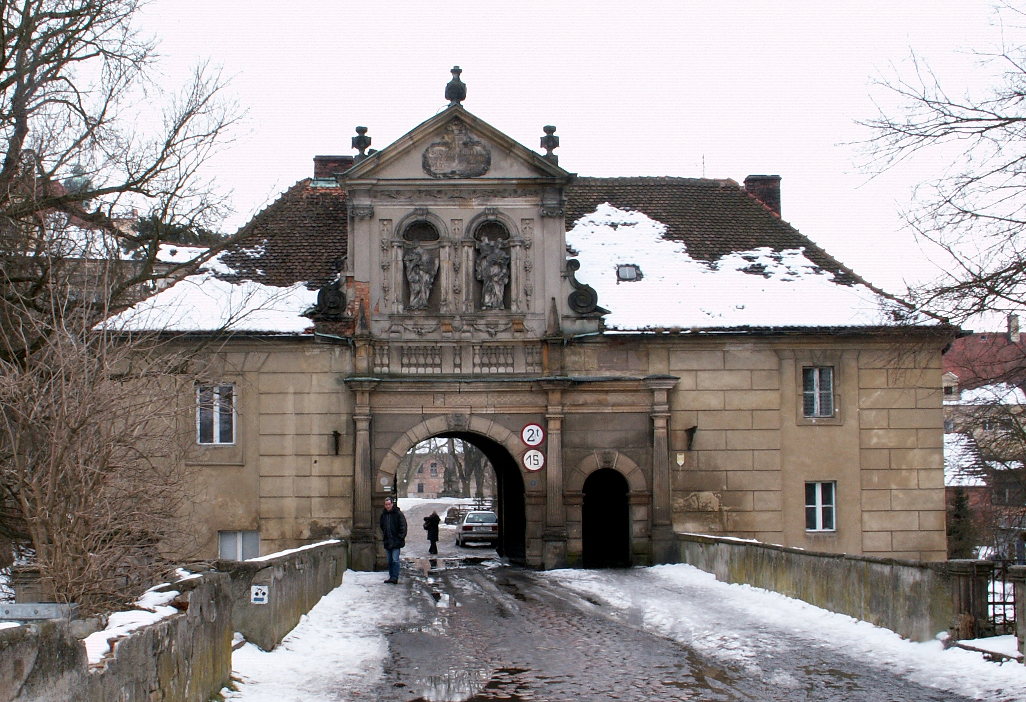 Gate bulding in Lubiąż